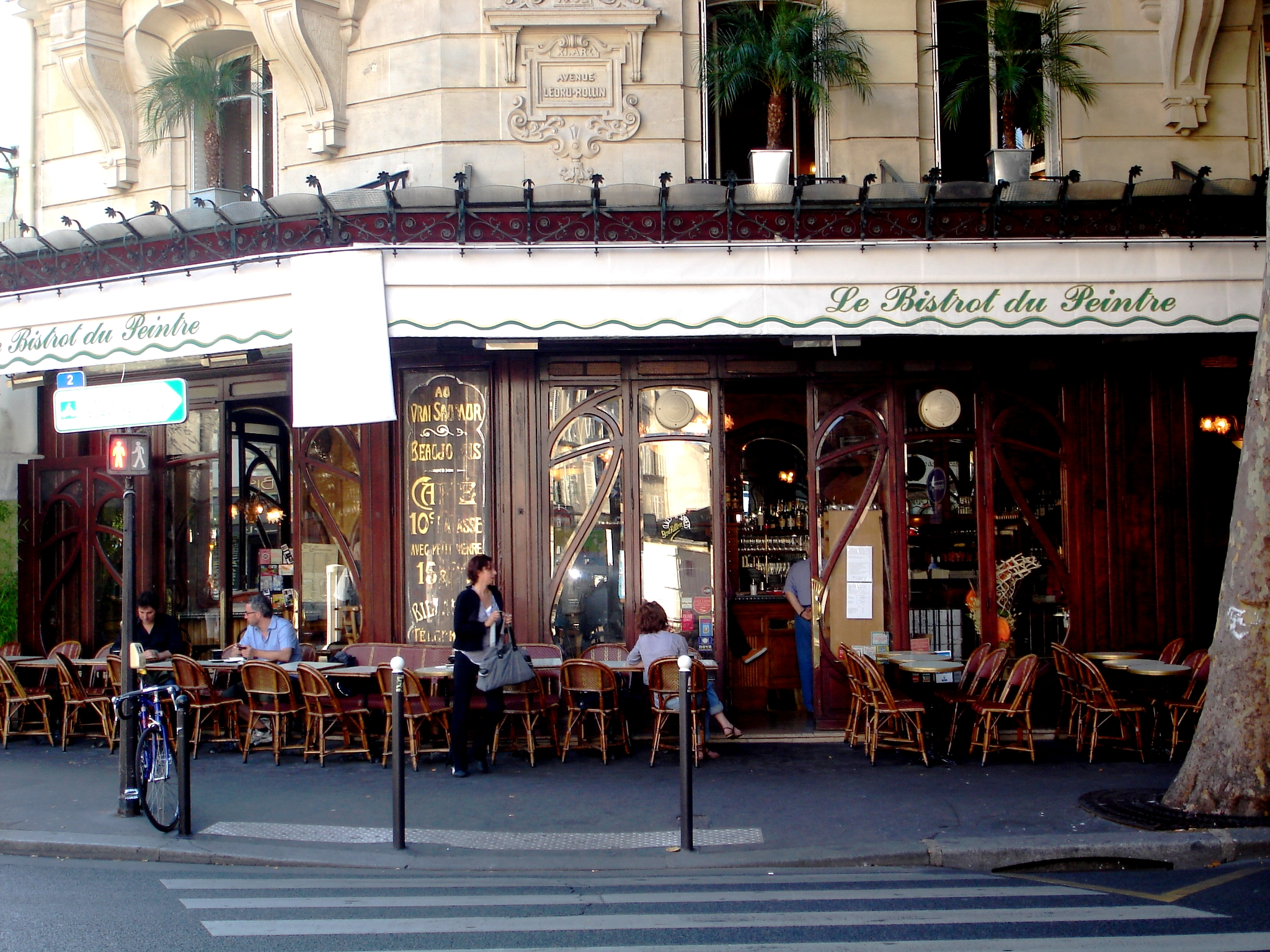 Bar Art Nouveau located 116 rue Ledru-Rollin/50 rue de Charonne; Paris 11